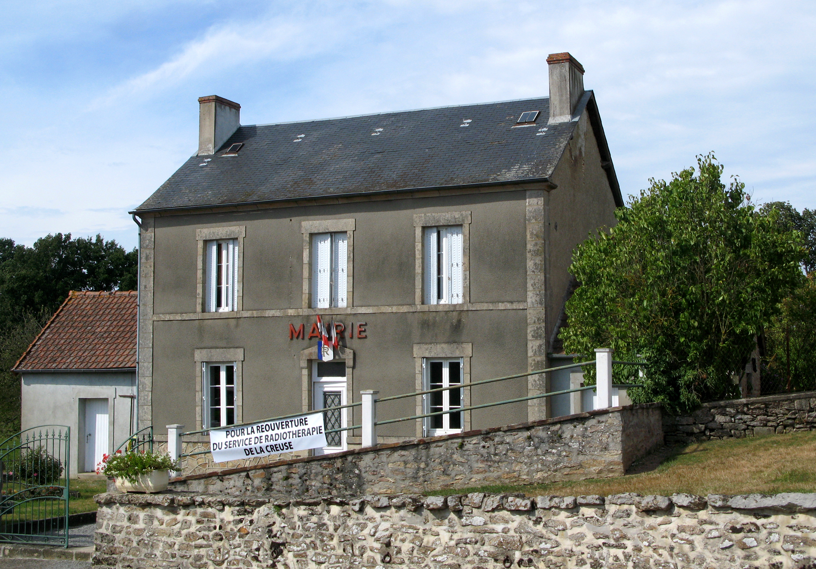 Sagnat (Creuse, France) - La mairie. Comme d'autres municipalités du département, la mairie arbore en 2010 une banderole signalant son opposition à la fermeture du centre de radiothérapie de la Creuse. .